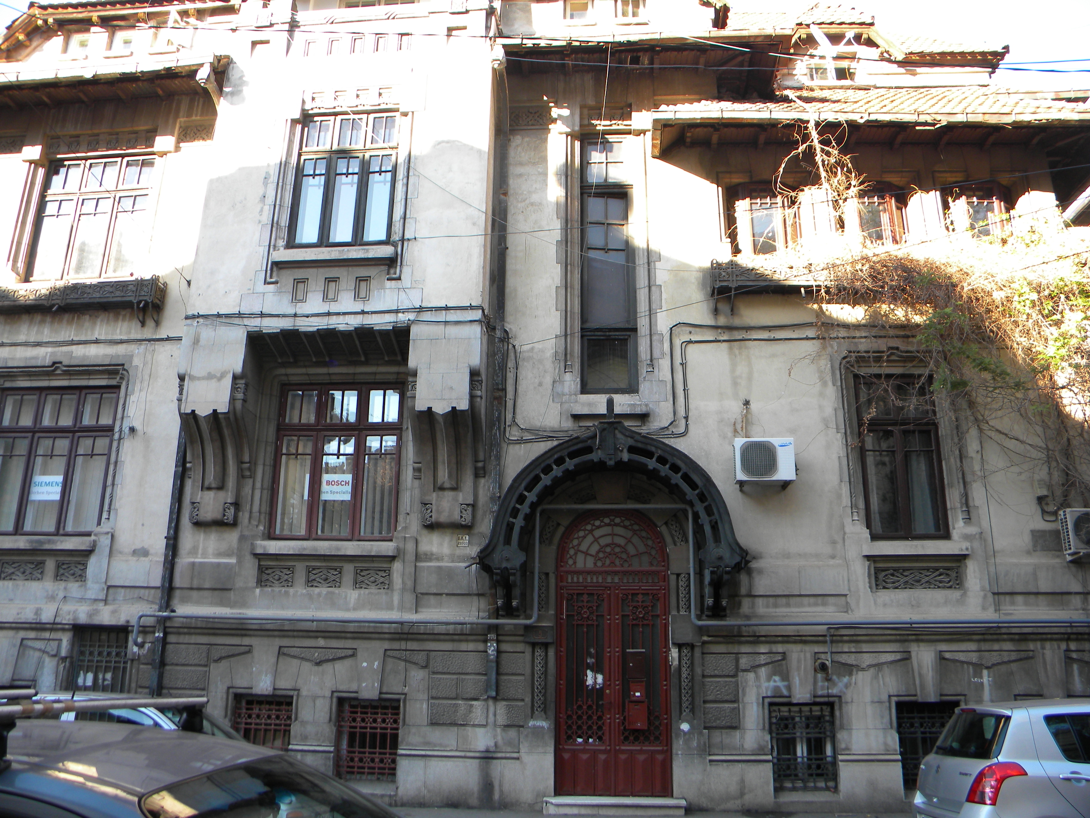 Bucuresti, Romania, Str. Alexandru Philippide nr. 5, sect. 2 (Cod B-II-m-B-19378) (1 prim)